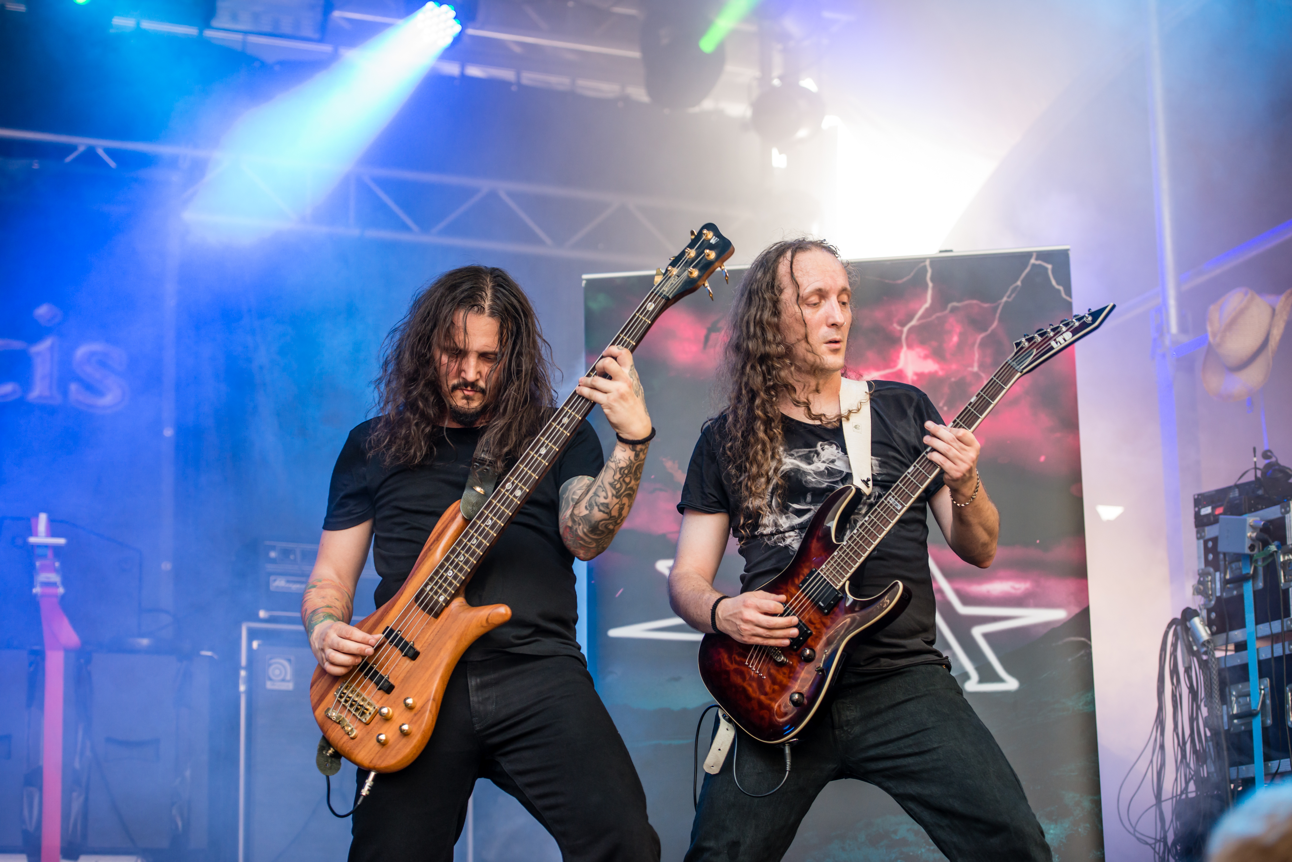 'Castle Rock 2015; Mülheim Schloß Broich': 'Visions of Atlantis'